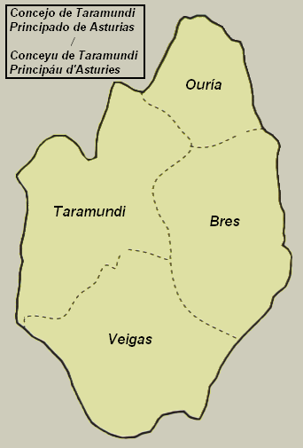 Mapa del conceyu de Taramundi (Asturies, España) con toes les parroquies. Mapa del concejo de Taramundi (Asturias, España) con todas las parroquias. Fechu por / Hecho por / Made by : rsg